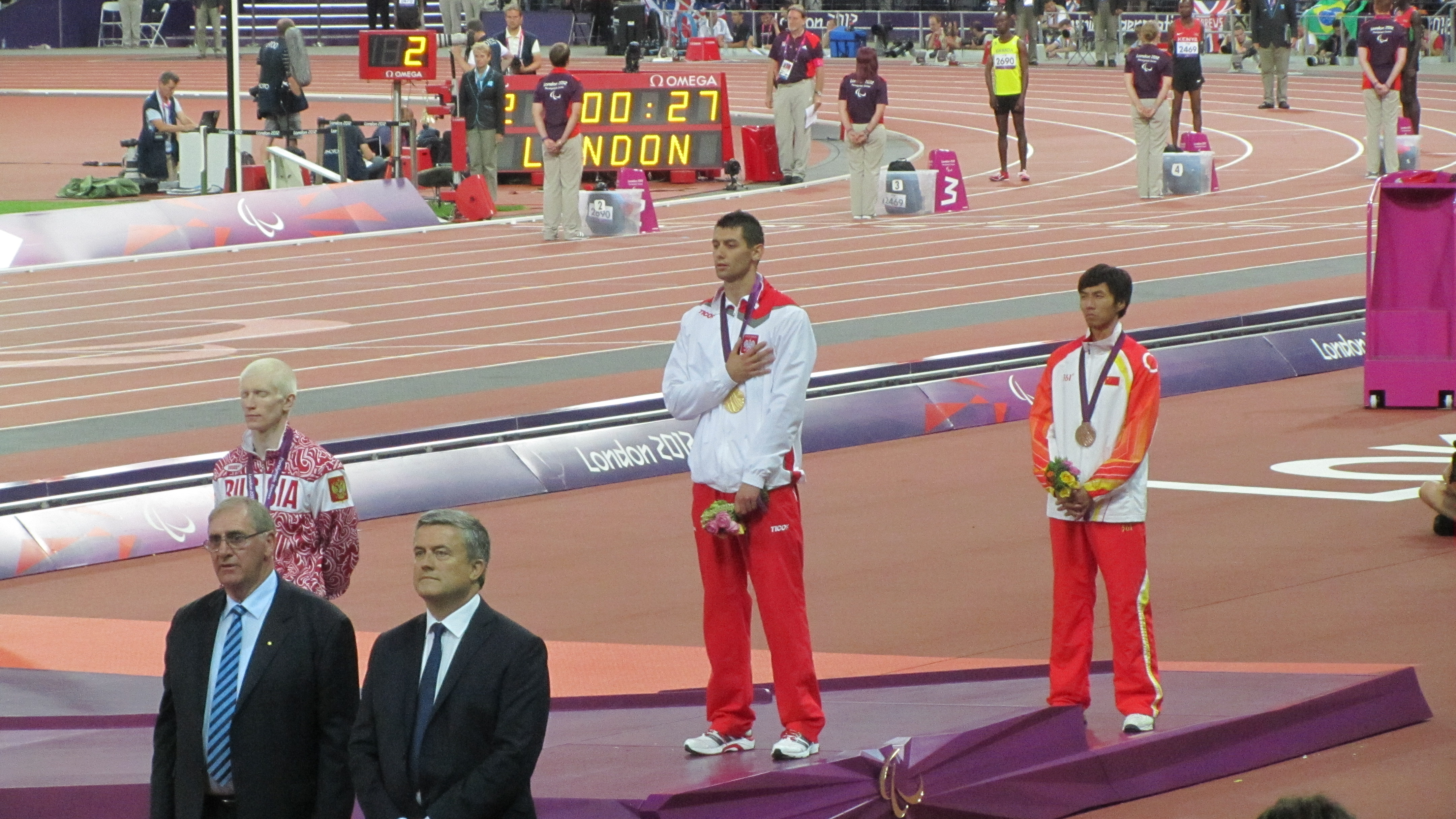 Gold: Mateusz Michalski (Poland); Silver: Fedor Trikolich (Russia); Bronze: Li Yansong (China)